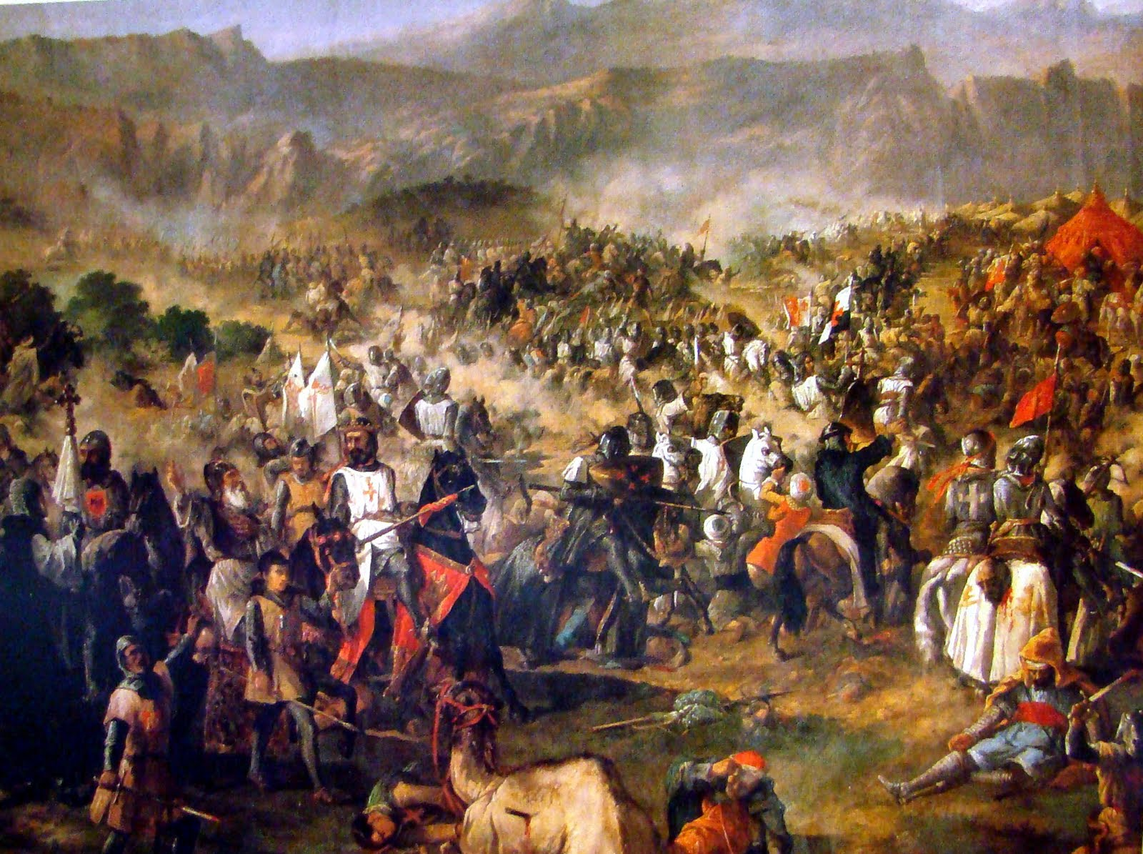 Esta obra, que fue depositada por el Museo del Prado en 1878 en el Palacio del Senado de España, representa la batalla de las Navas de Tolosa, que se libró el día 16 de Julio de 1212 en las cercanías del municipio jienense de Santa Elena. Y es conocida también como la batalla de los tres reyes, ya que en ella combatieron los monarcas Alfonso VIII de Castilla, Pedro II de Aragón y Sancho VII de Navarra.